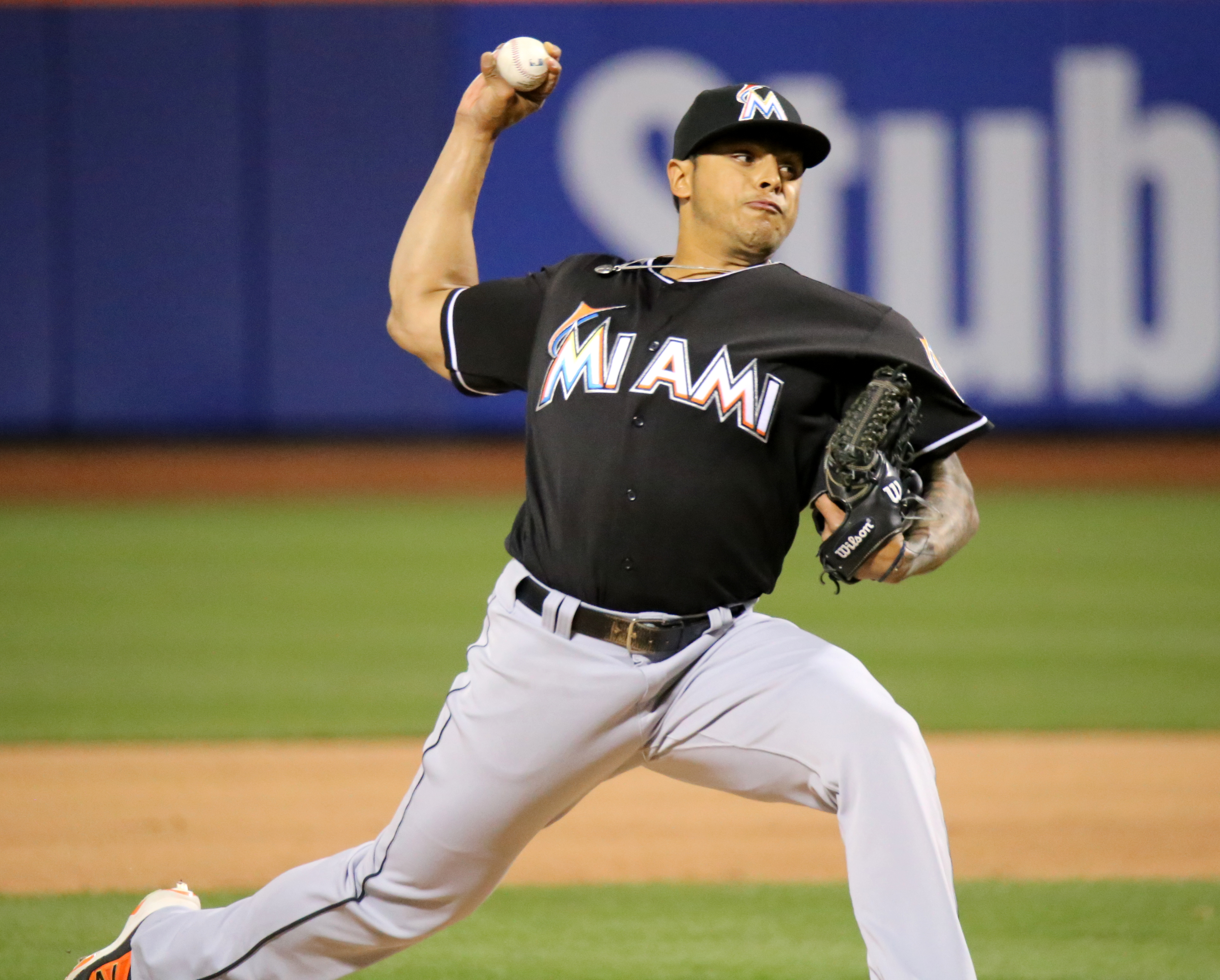 A. J. Ramos